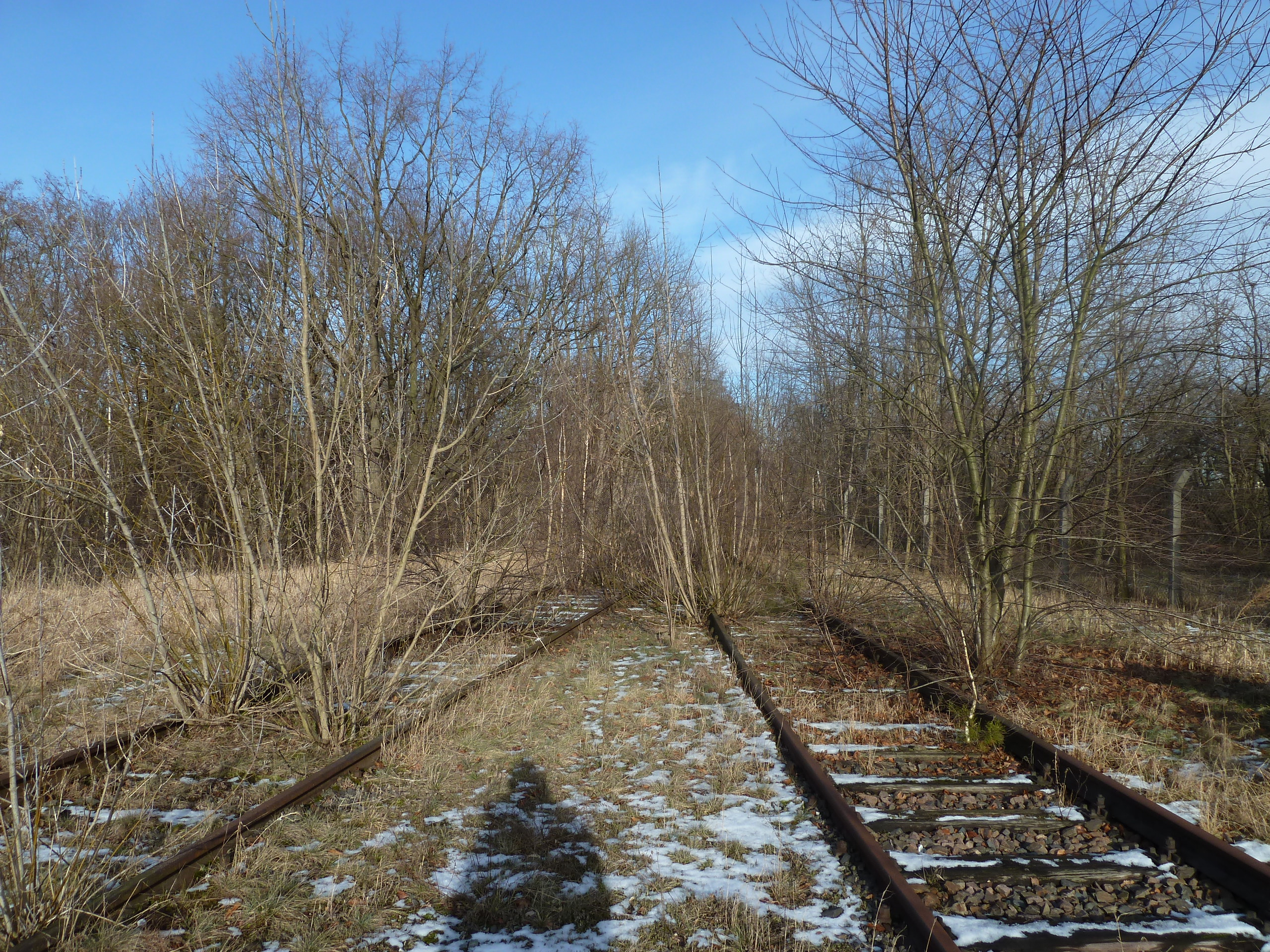 Jüterbog Miltärbahnhof, Gleisreste.